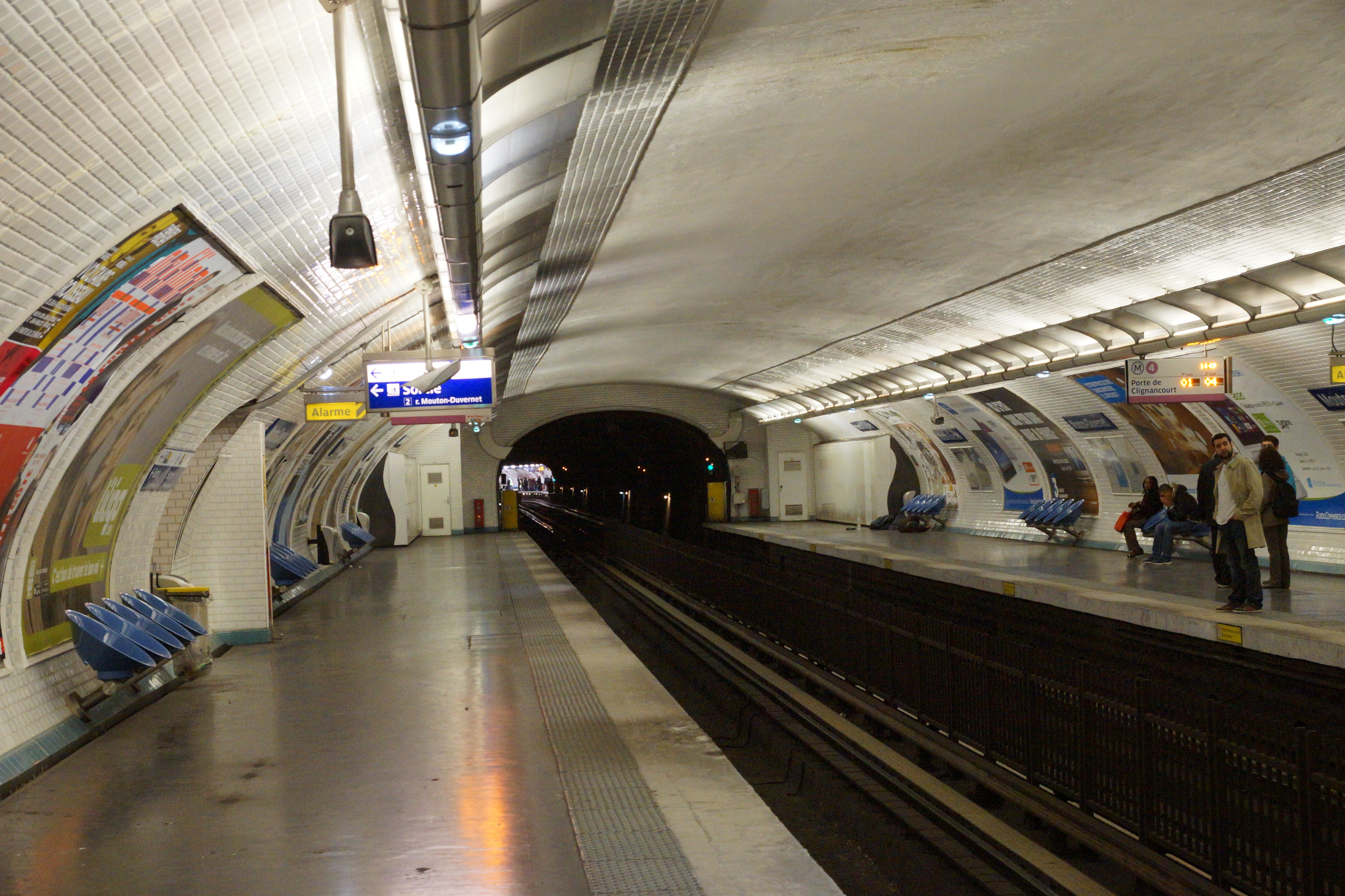 Mouton-Duvernet metro station, Paris.